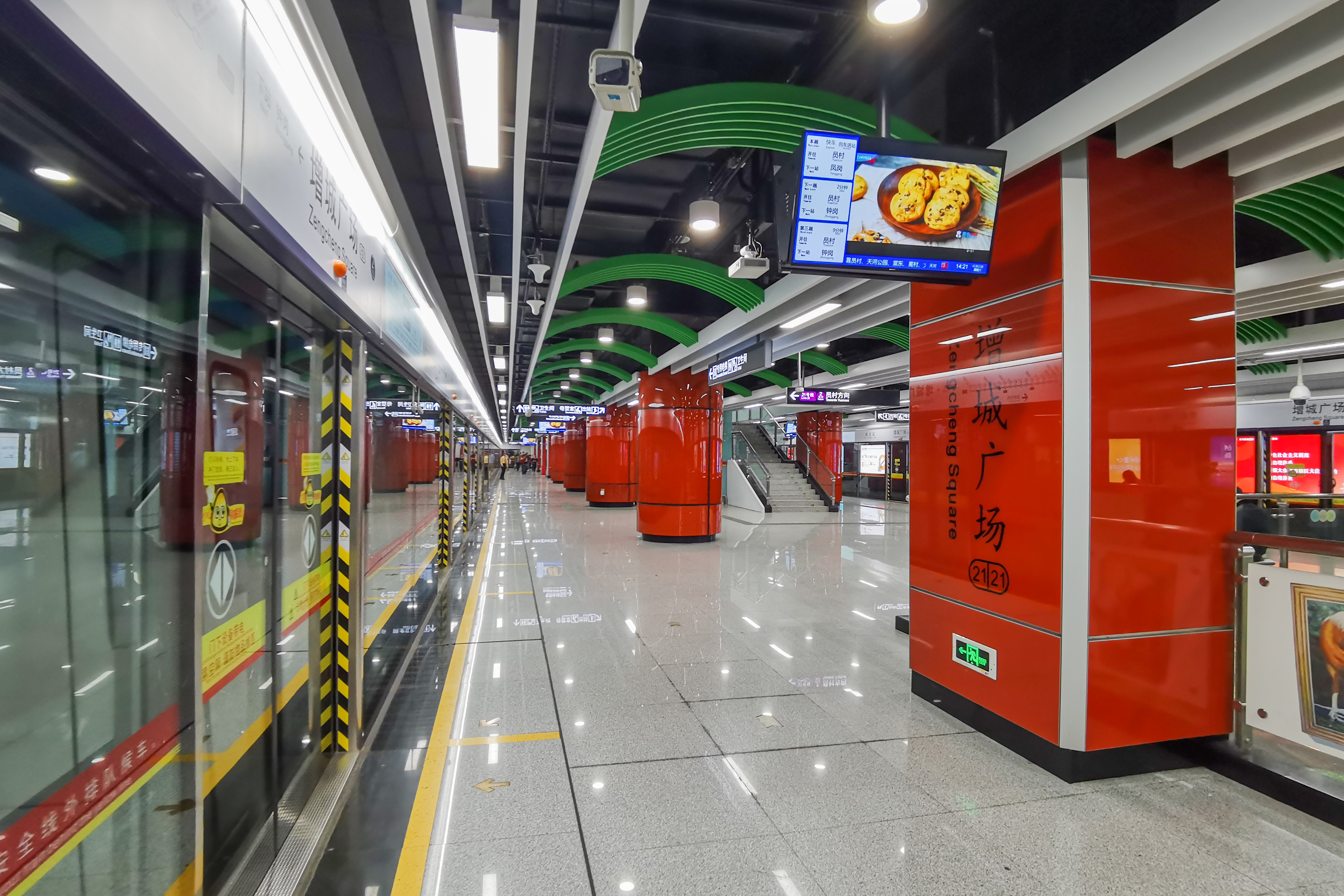 广州地铁增城广场站